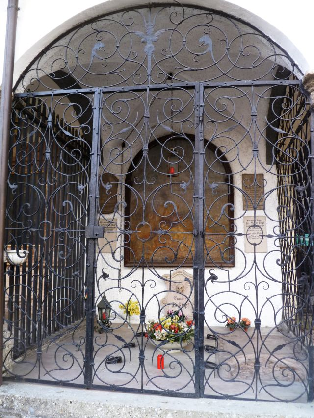 Gruft 53 (Petersfriedhof Salzburg): Grabstätte der Familie Dopf mit Metallgitter von Hanns Georg Khlain